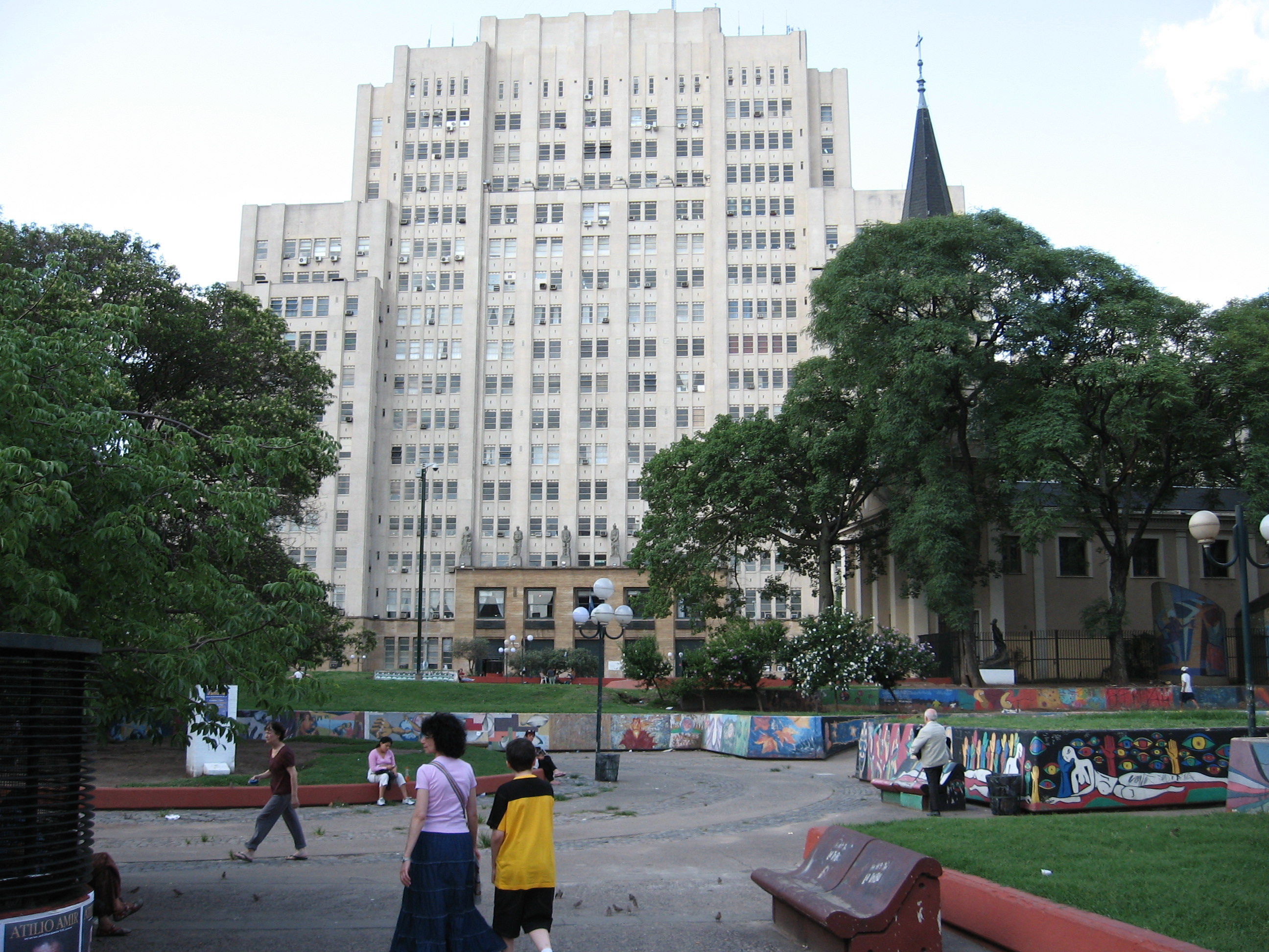 Facultad de Medicina de la Universidad de Buenos Aires, en la Ciudad de Buenos Aires